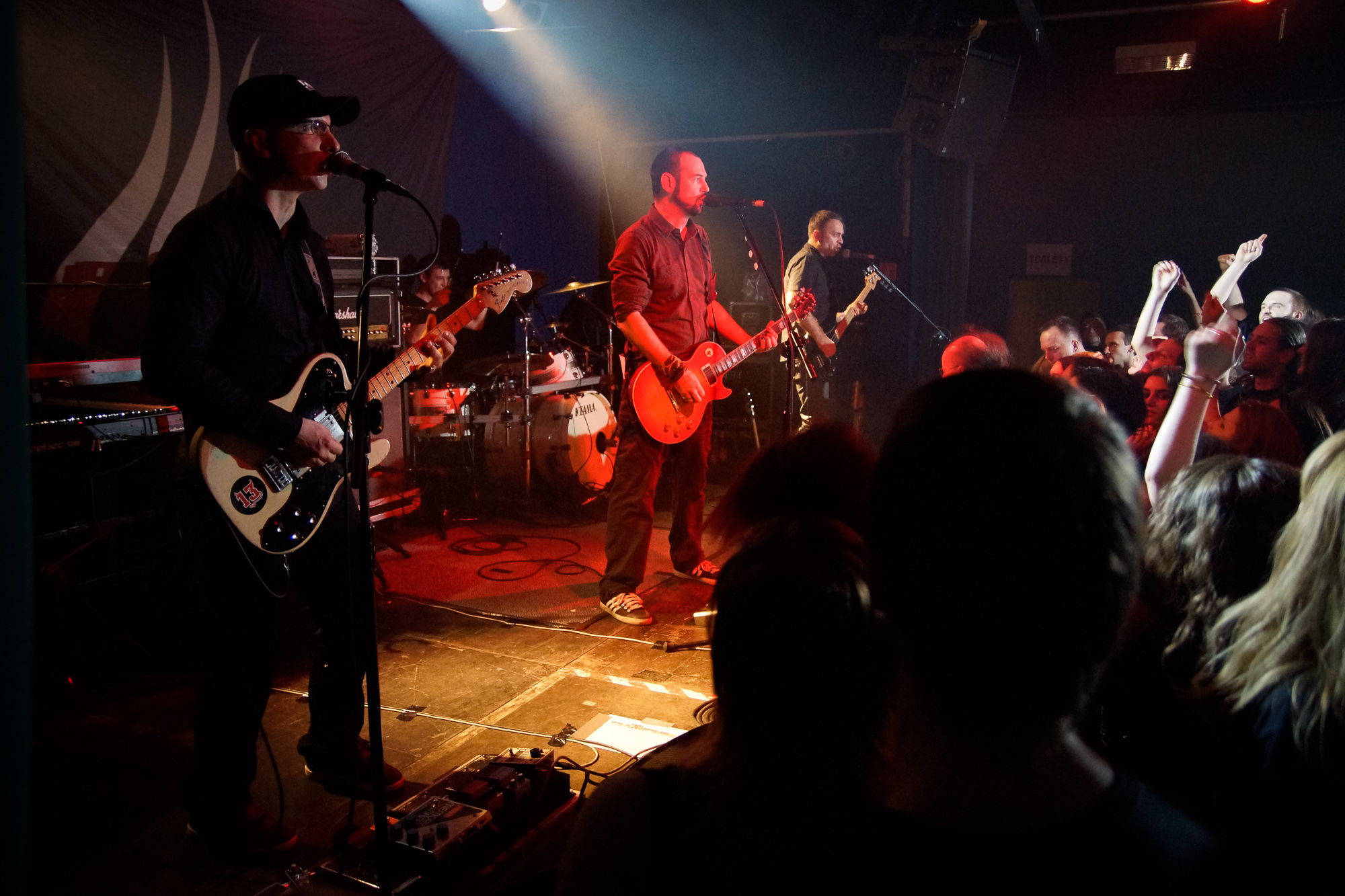 Zespół Siddharta, Progresja, Warszawa 2014.